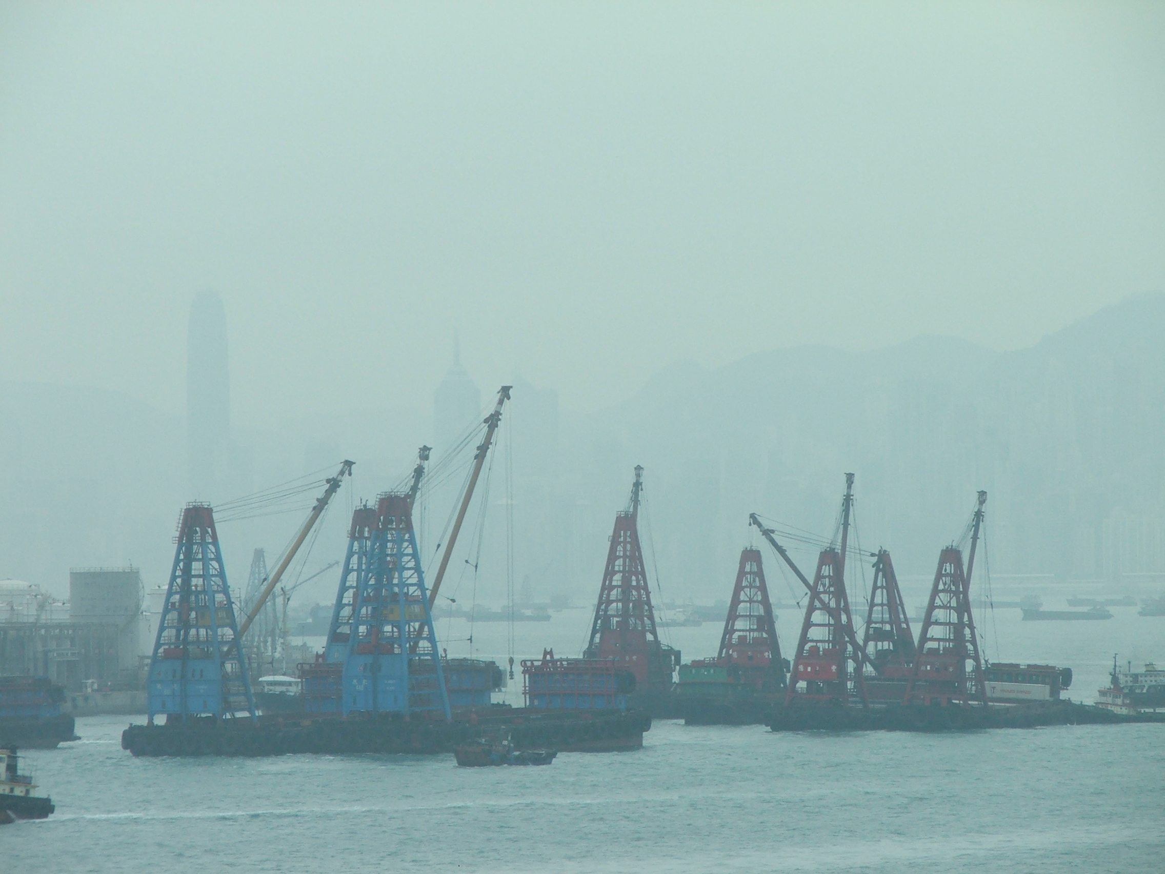 Hong Kong Derrick Barges